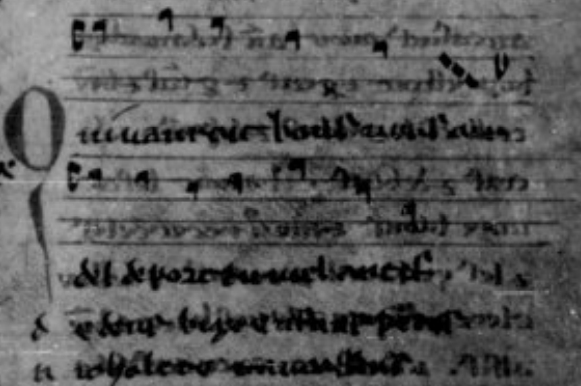 Manuscrit BNF français 2168 folio 70 verso (détail)